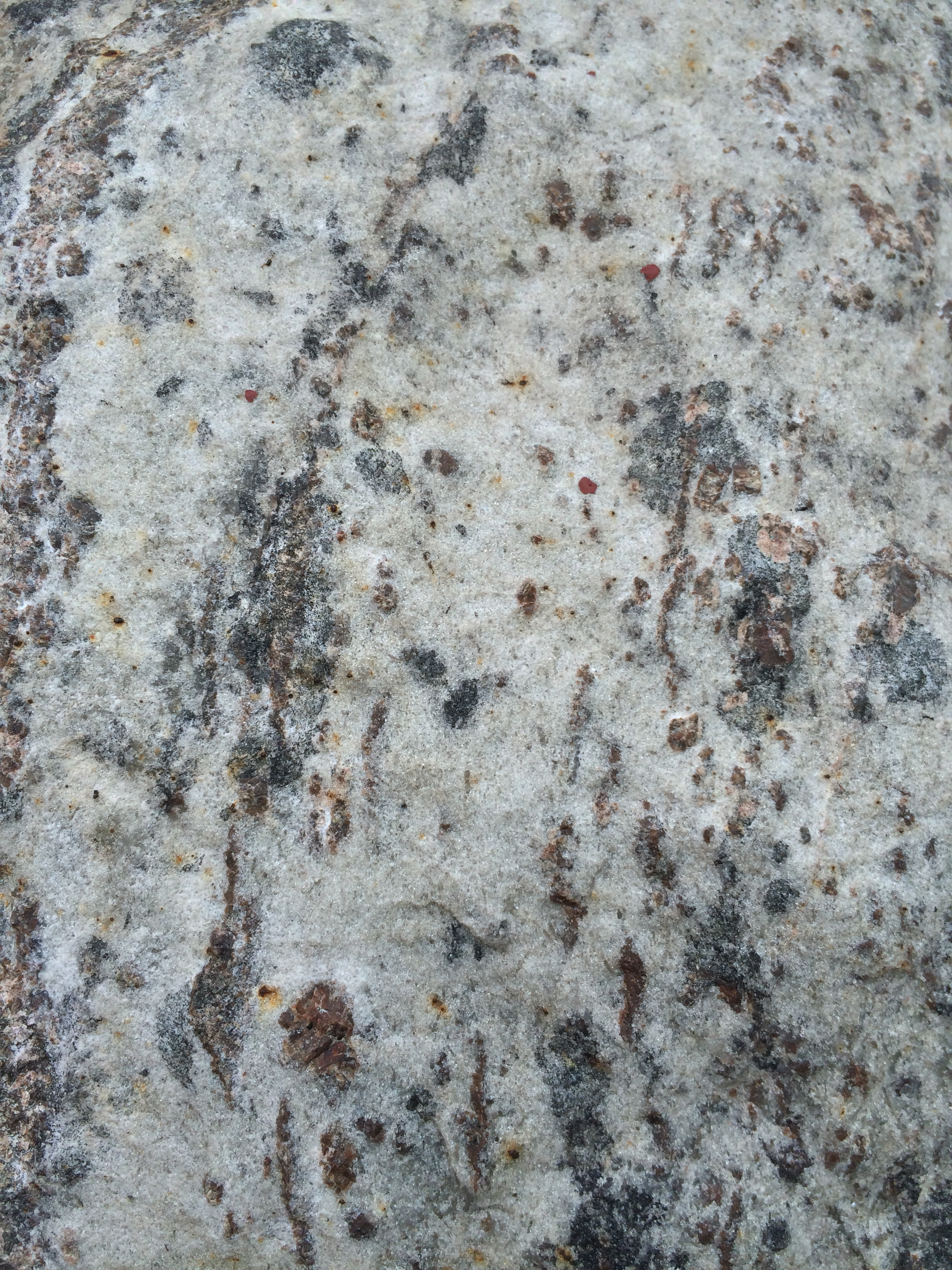 Апатитонефелиновая руда, Хибины